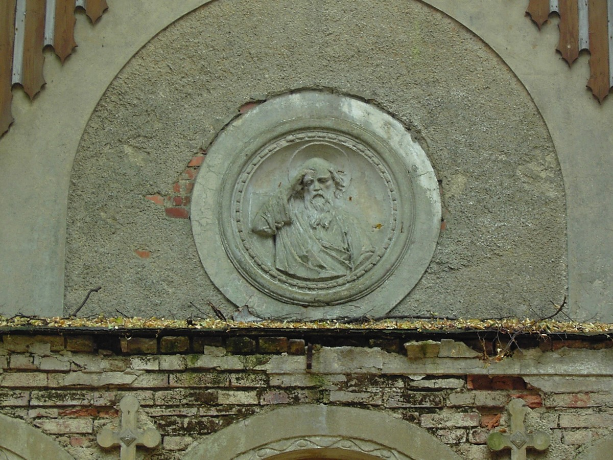 Kaple svatého Jáchyma na vrchu Jáchym u Lobendavy